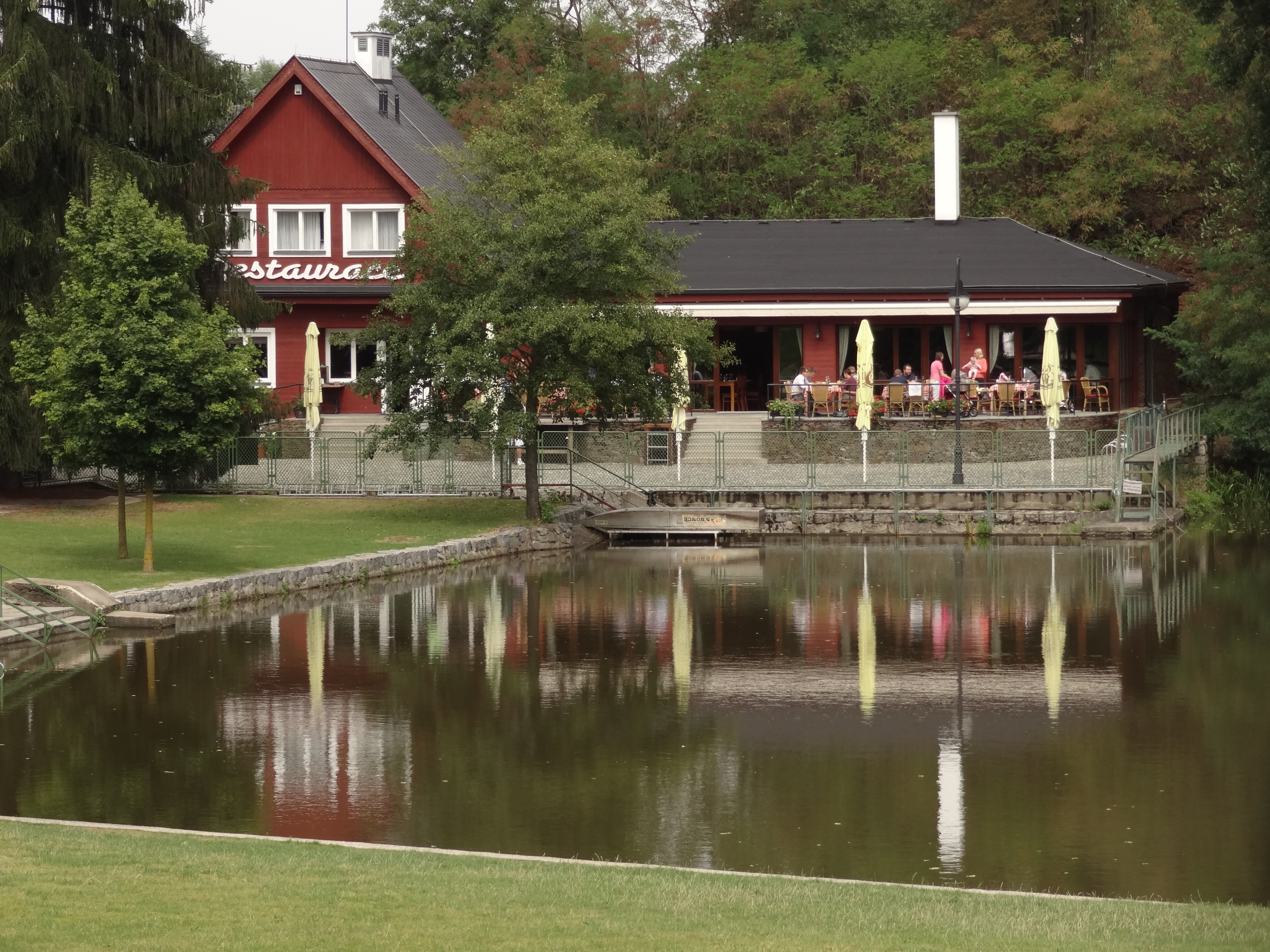 Říčany-Radošovice - rybník Jureček s restaurací